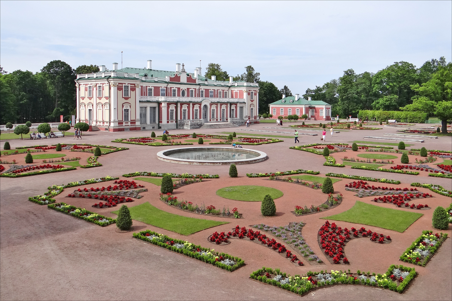 Ce palais a été conçu en 1720 par l'architecte italien Nicollo Michetti (1675-1743) , puis terminé par un de ses élèves : Mïkhail Zemtsov sur ordre du tsar Pierre le Grand. C'était un palais d'été destiné à la famille du Tsar entouré d'un grand parc qui a été en grande partie conservé. C'est aujourd'hui un musée d'art et le parc de Kadriorg est l’un des lieux de promenade favoris des habitants de Tallinn.